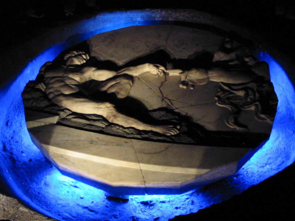 Escultura inspirada en el Adan de Miguel Angel Catedral de Sal, Zipaquirá, Cundinamarca, Colombia